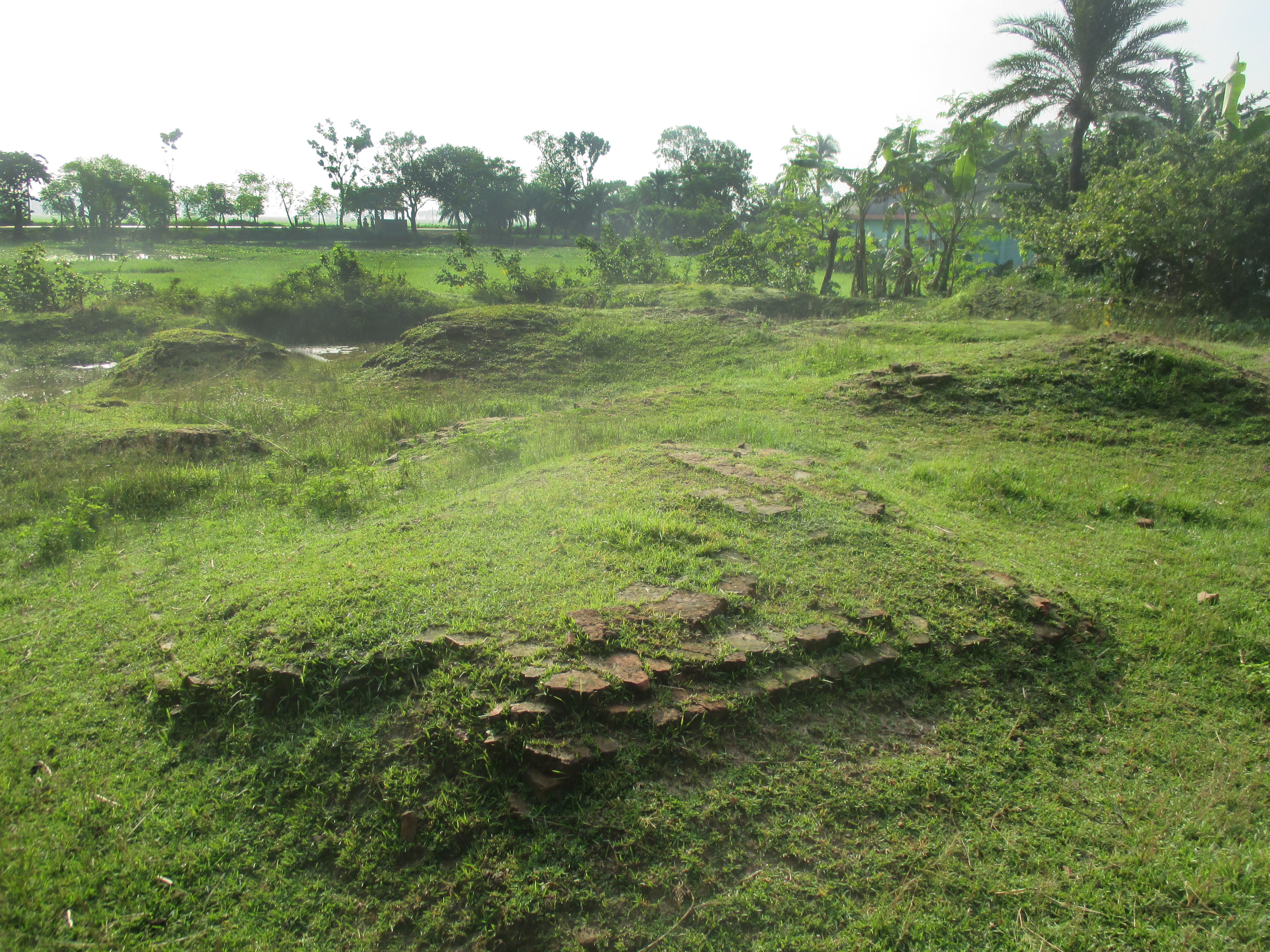 দমদম পীরের ঢিবি